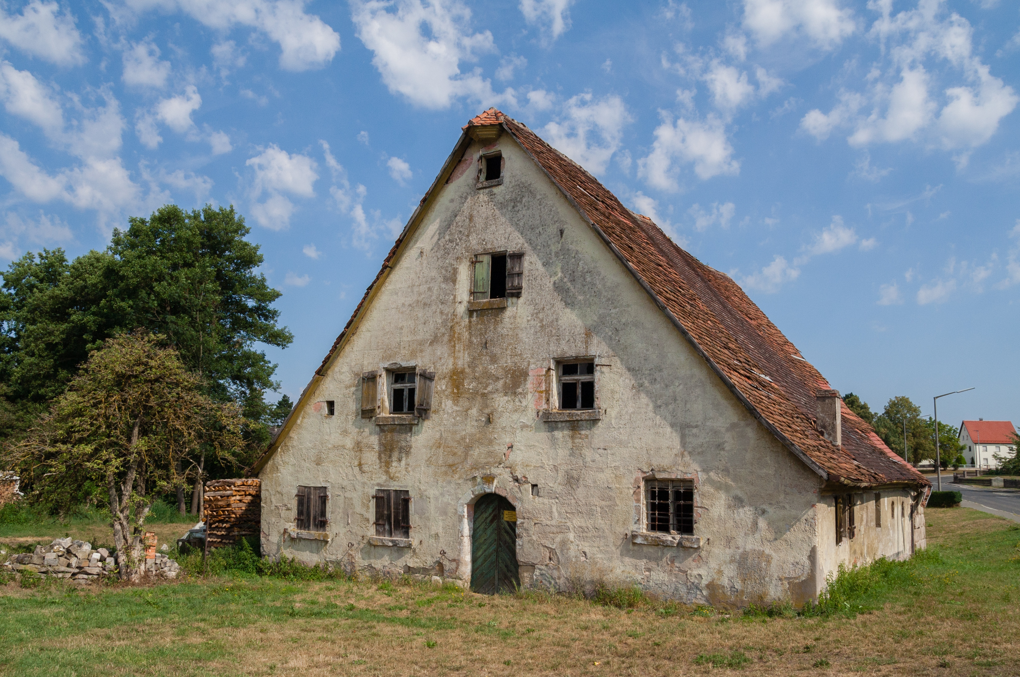 Wohnstallhaus in Burgthann, Landkreis Nürnberger Land. Eingeschossiger Sandsteinquaderbau mit Steildach, rückseitiger Giebel Fachwerk, zweite Hälfte 18. JahrhundertThis is a photograph of an architectural monument.